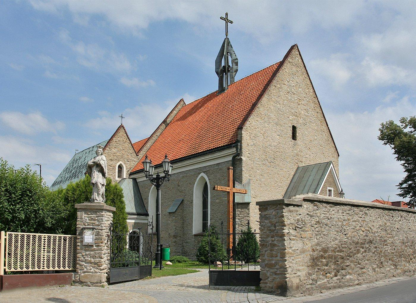 Dawny kościół ewangelicki przejęty przez katolików.